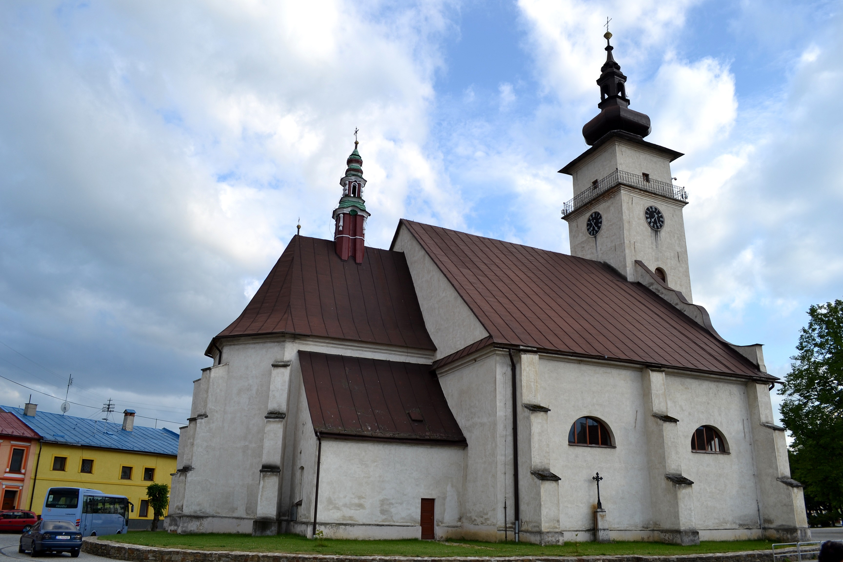 Farský Kostol Nanebovzatia Panny Márie v Podolínci; pohľad zo severovýchodu